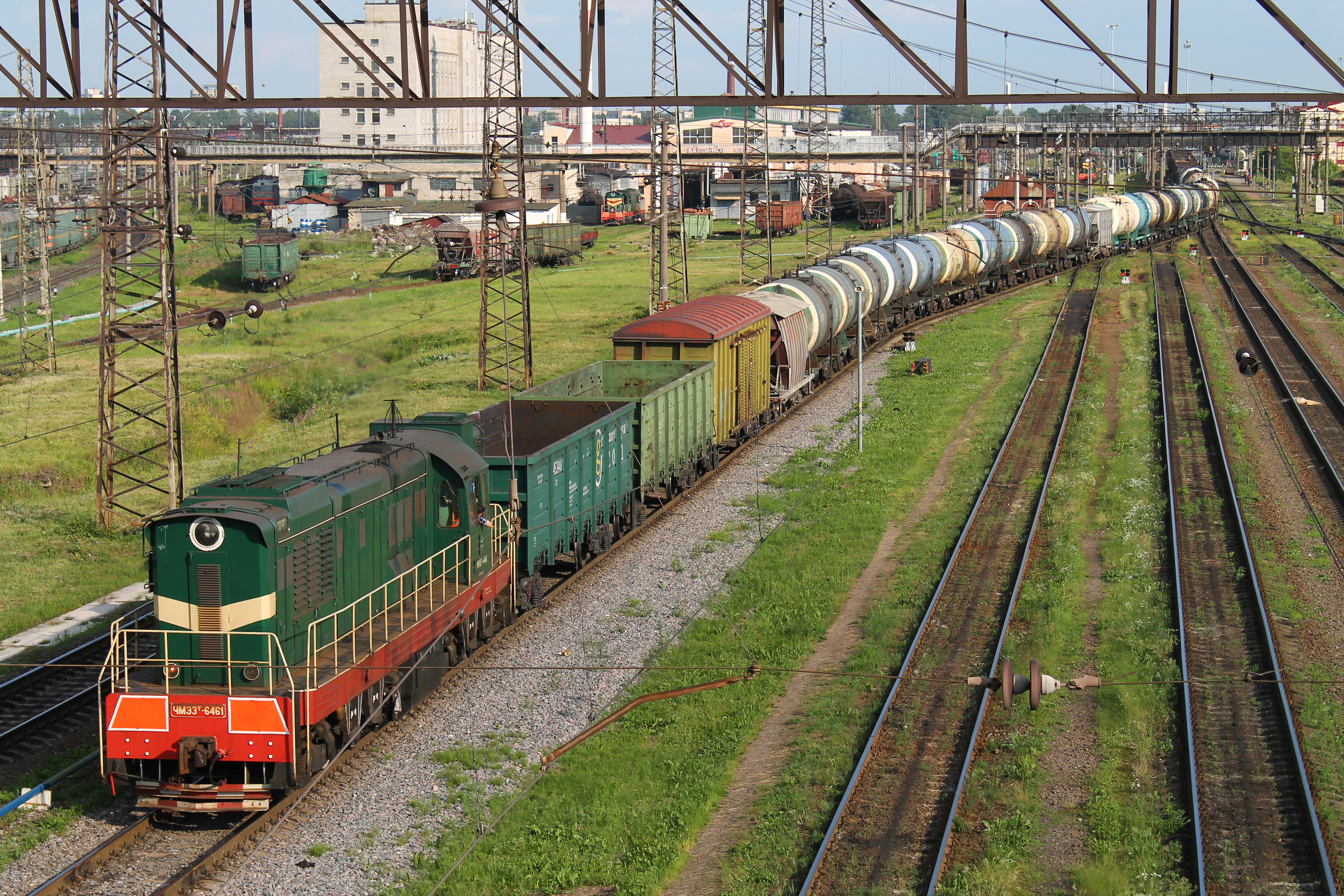 ЧМЭ3-6461 толкает состав к сортировочной горке, Санкт-Петербург-Сортировочный-Московский. см. фото 516799 в альбоме автора